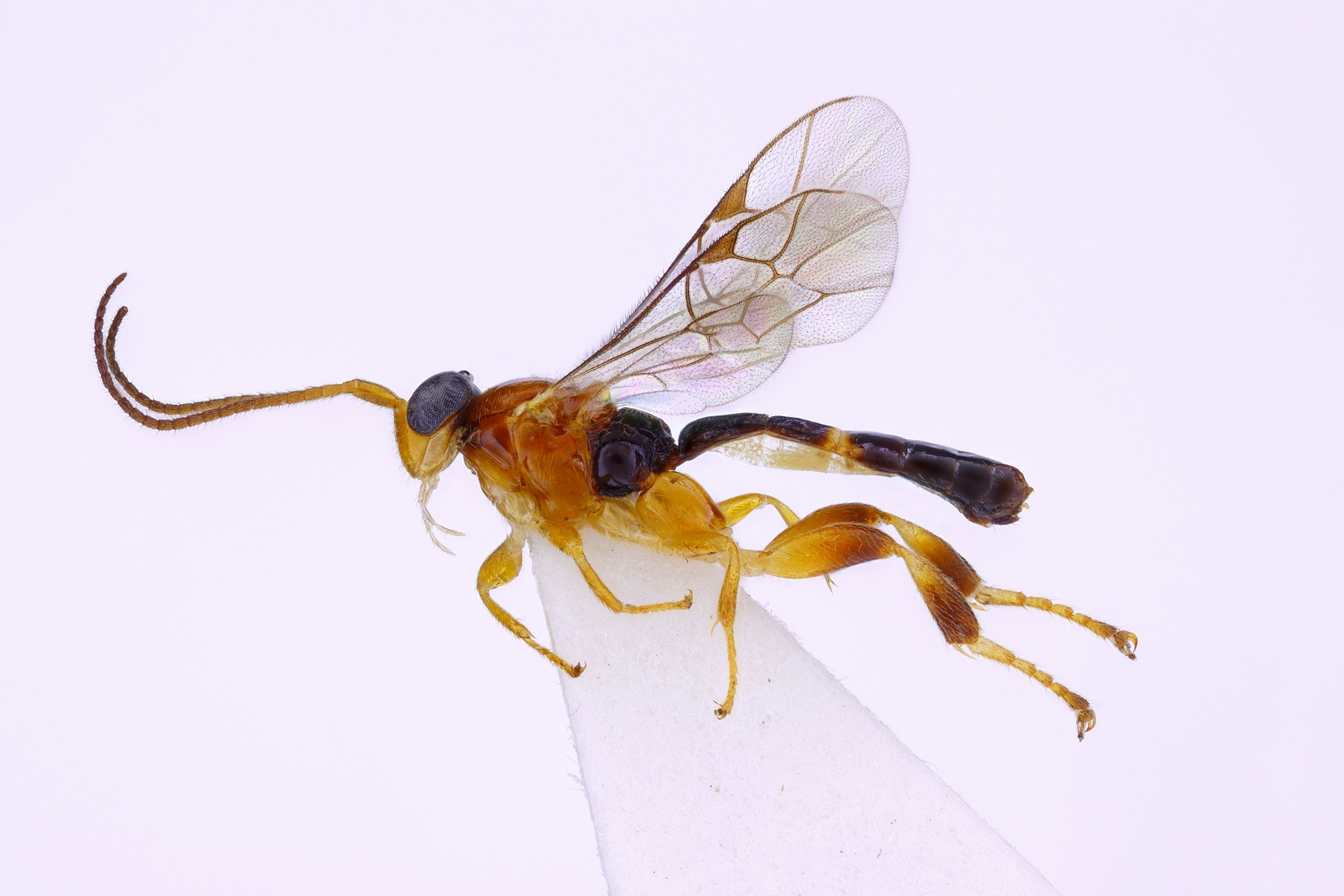 Schlupfwespe der Art Orthocentrus margarethae Zwakhals, 2015 (Orthocentrinae) aus Peru (Dept. Huánuco, Panguana). Publikation: Mitt. Münchner Ennt. Ges. 105, 65-78, 2015.